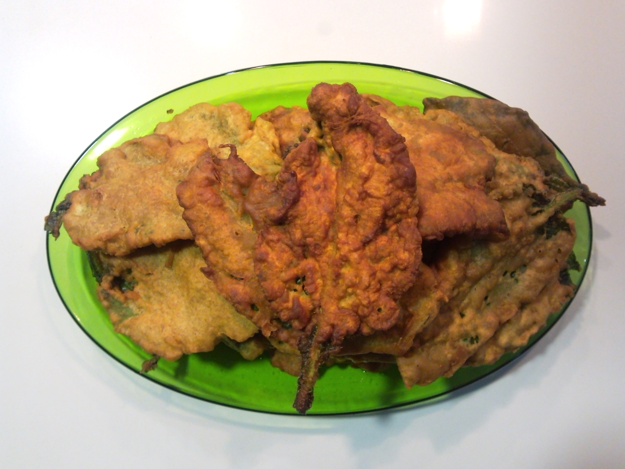 Borraines